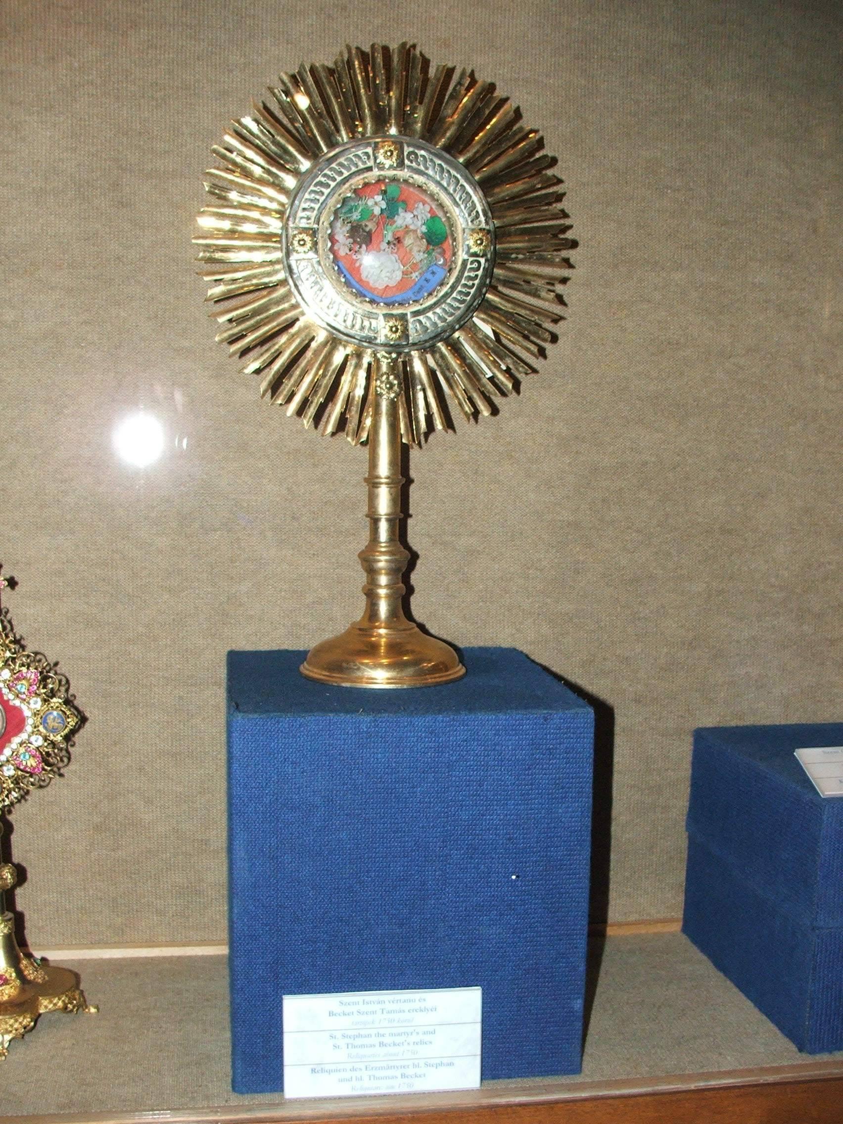 Szent István vértanú és Becket Szent Tamás ereklyéi, Főszékesegyházi Kincstár